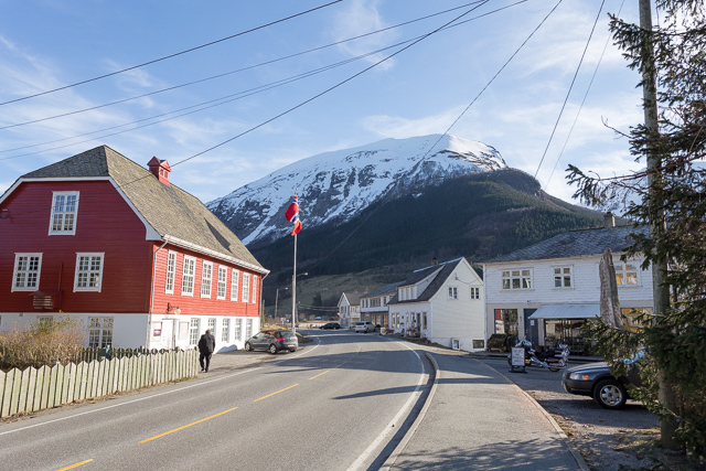 Uskedalen ungdomshus